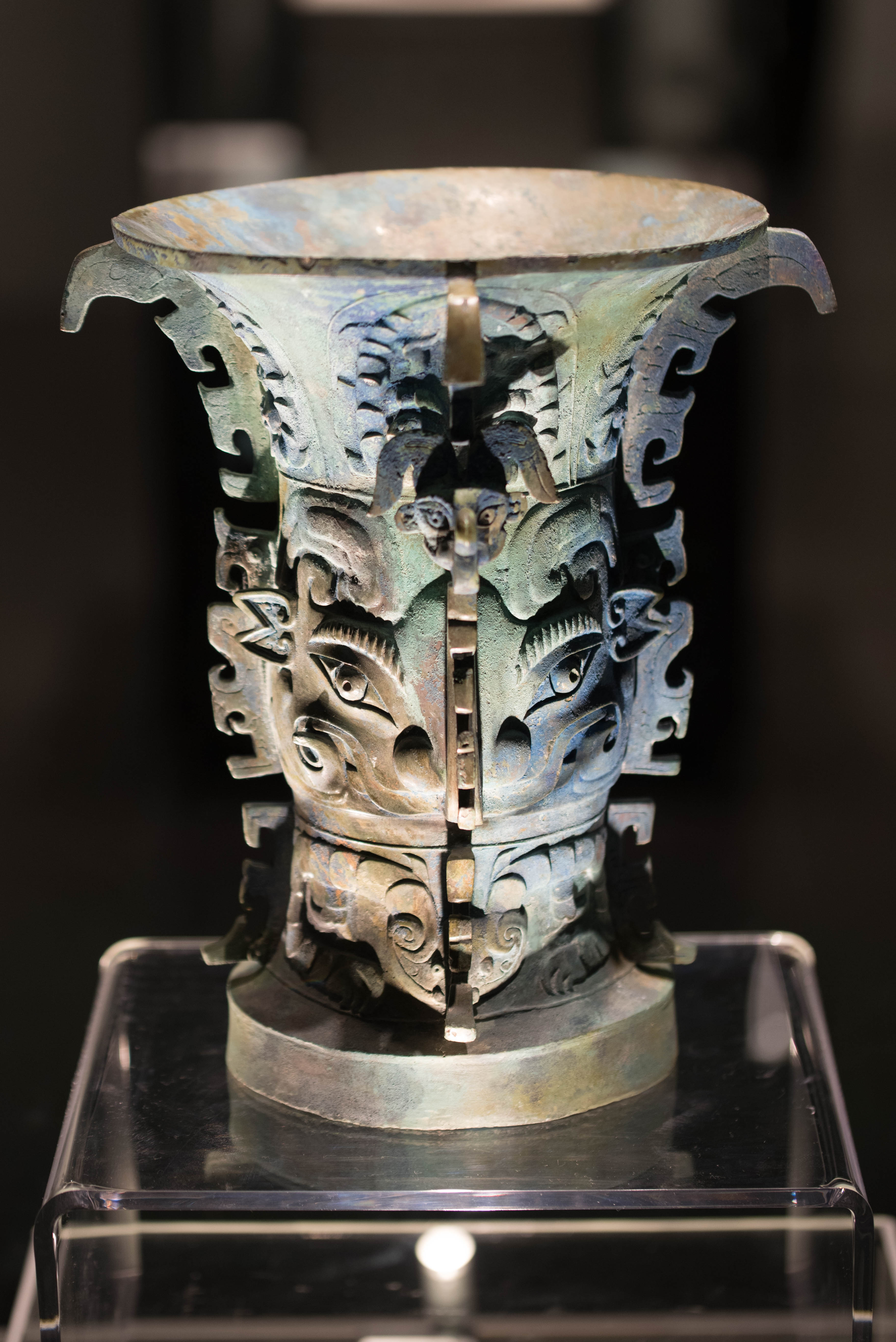 兽面扉棱尊，年代西周早期，出土于安居羊子山M4:26